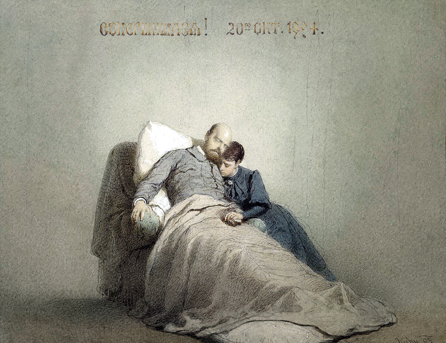 Zichy, Mihaly - Empress Maria Feodorovna with the body of Alexander III, Hermitage Императрица Мария Федоровна рядом с телом Александра III. Серия "Смерть Александра III в Ливадии". бумага, картон, акварель, графитный карандаш, белила. 23,5х30,5 см. ЭРР-8020. Эрмитаж